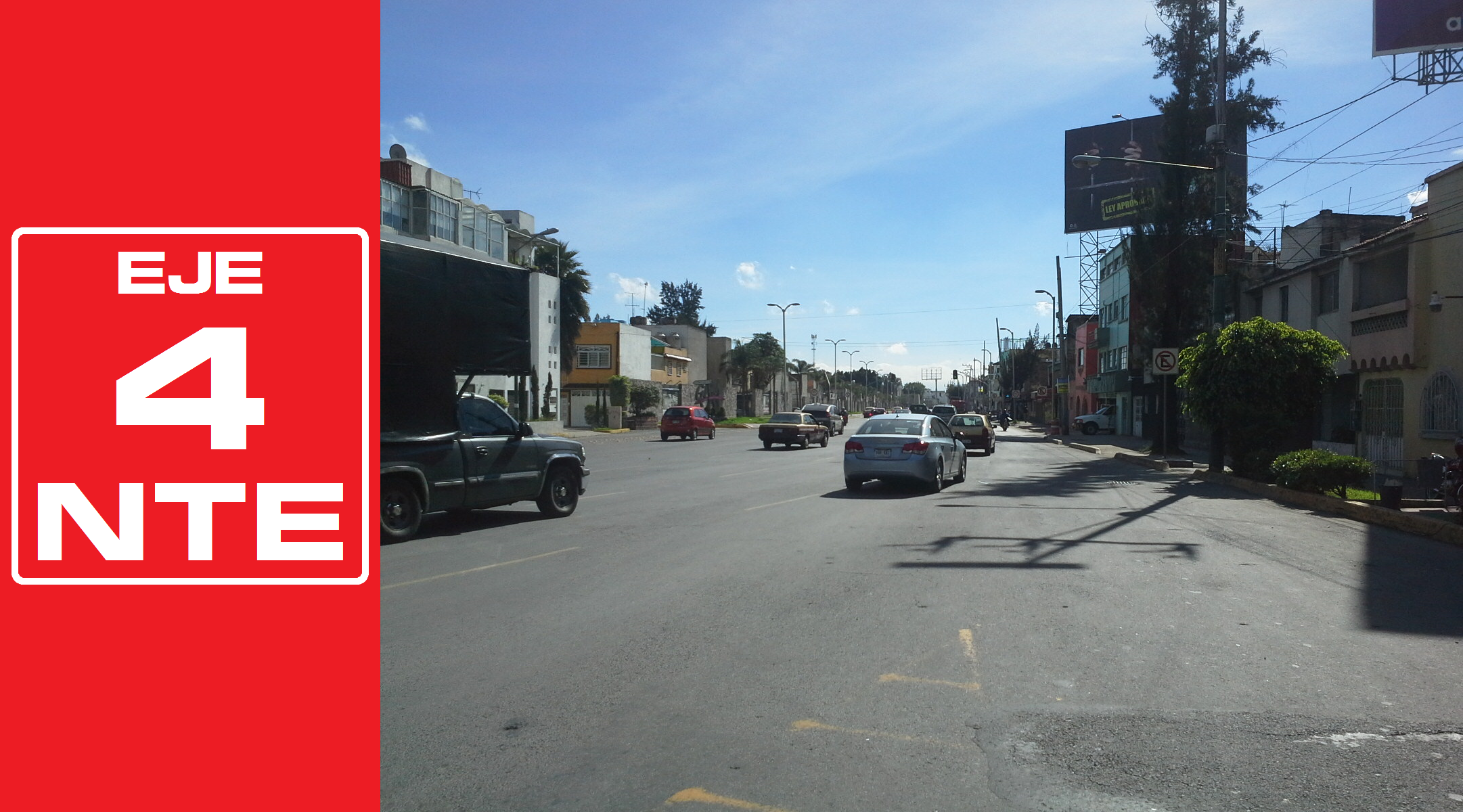 Rediseñado original de la señalética de los Ejes viales de la Ciudad de México por José García (Wiki ID: narumiyama)